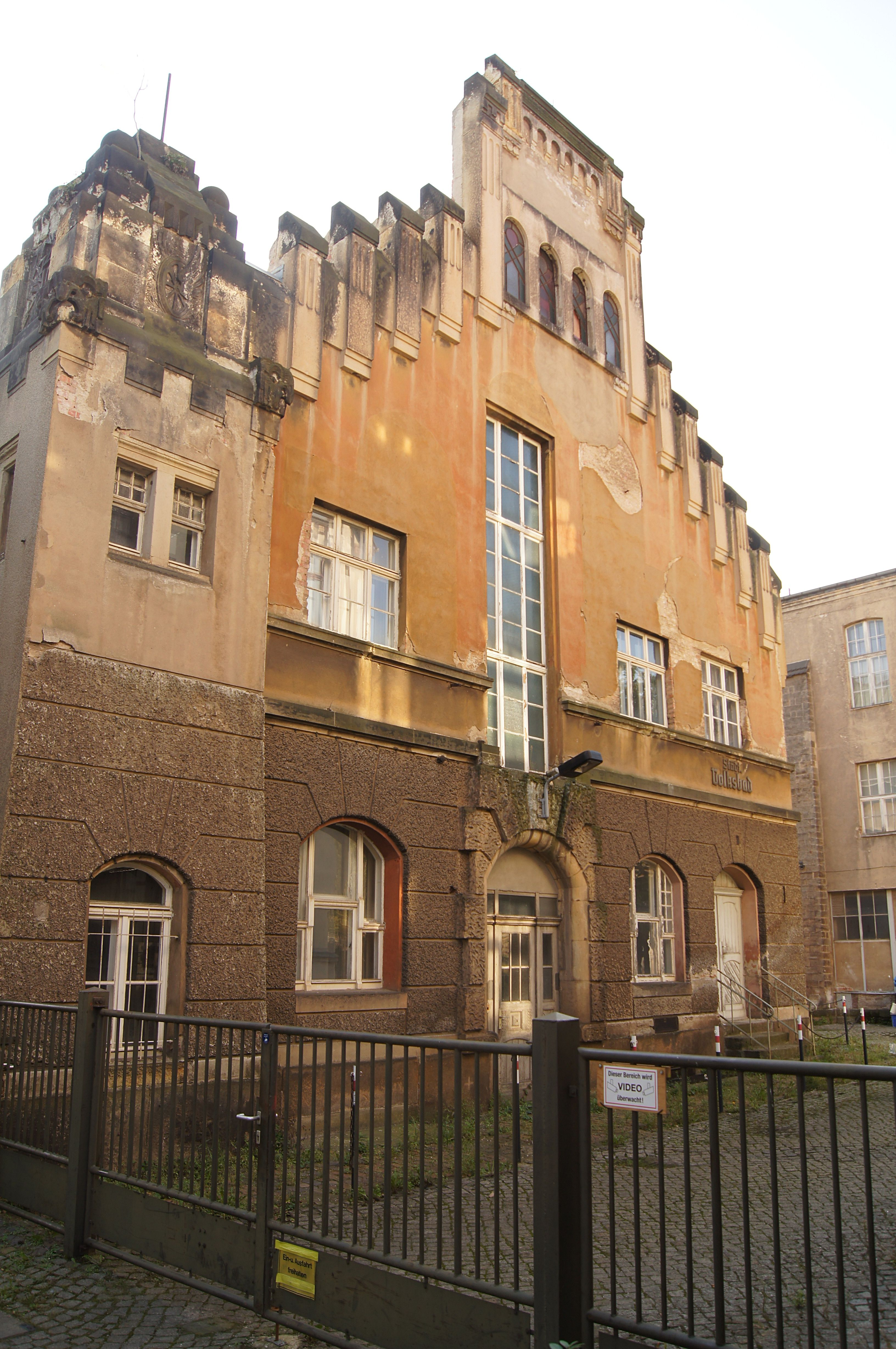 Gebäude auf dem Gelände des Betriebshofs Tolkewitz, ehem. Volksbad.